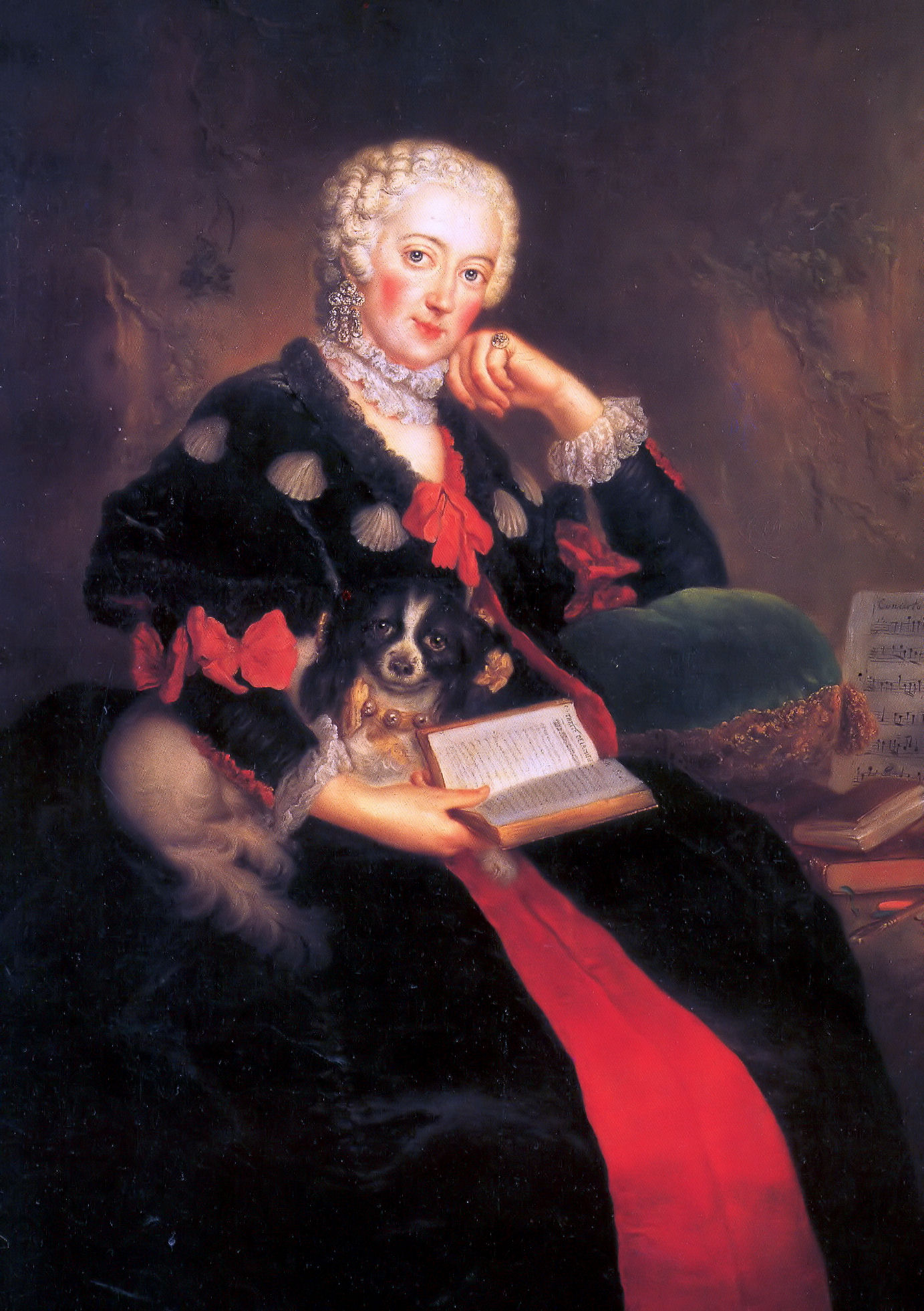 Markgräfin Wilhelmine von Brandenburg-Bayreuth